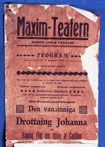 Annons för biografen "Maxim" i Birger Jarlspassagen i Stockholm